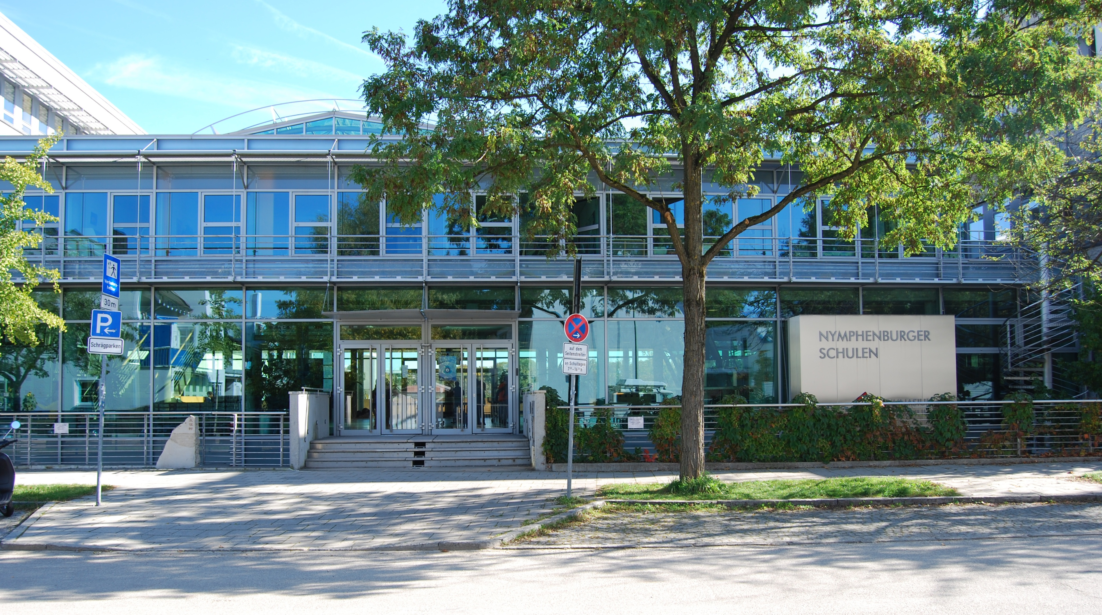 Eingangsbereich der Nymphenburger Schulen in München